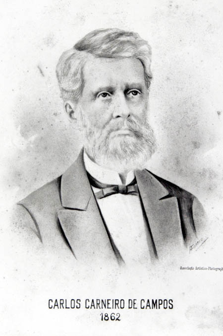 Carlos Carneiro de Campos, o terceiro Visconde de Caravelas